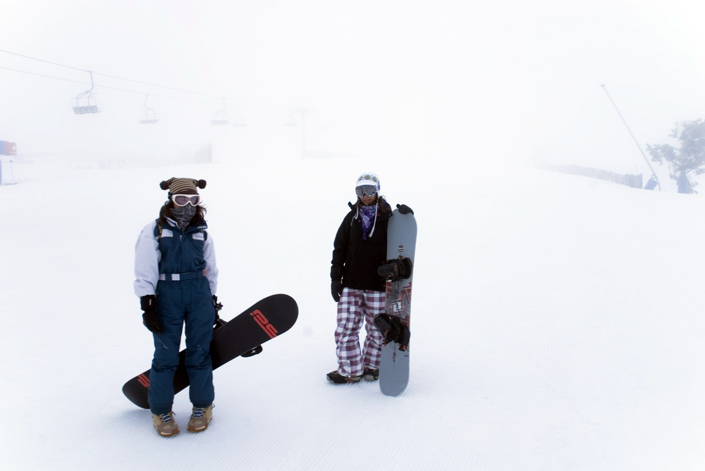 Aragonés: Snowboarders en Chabalambre (Tergüel, Aragón)